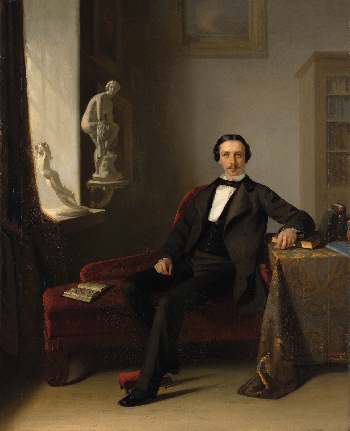 Abraham Willet (1825-1888)schilderij; portret; portret Amsterdam; mansportret; Willet, Abraham